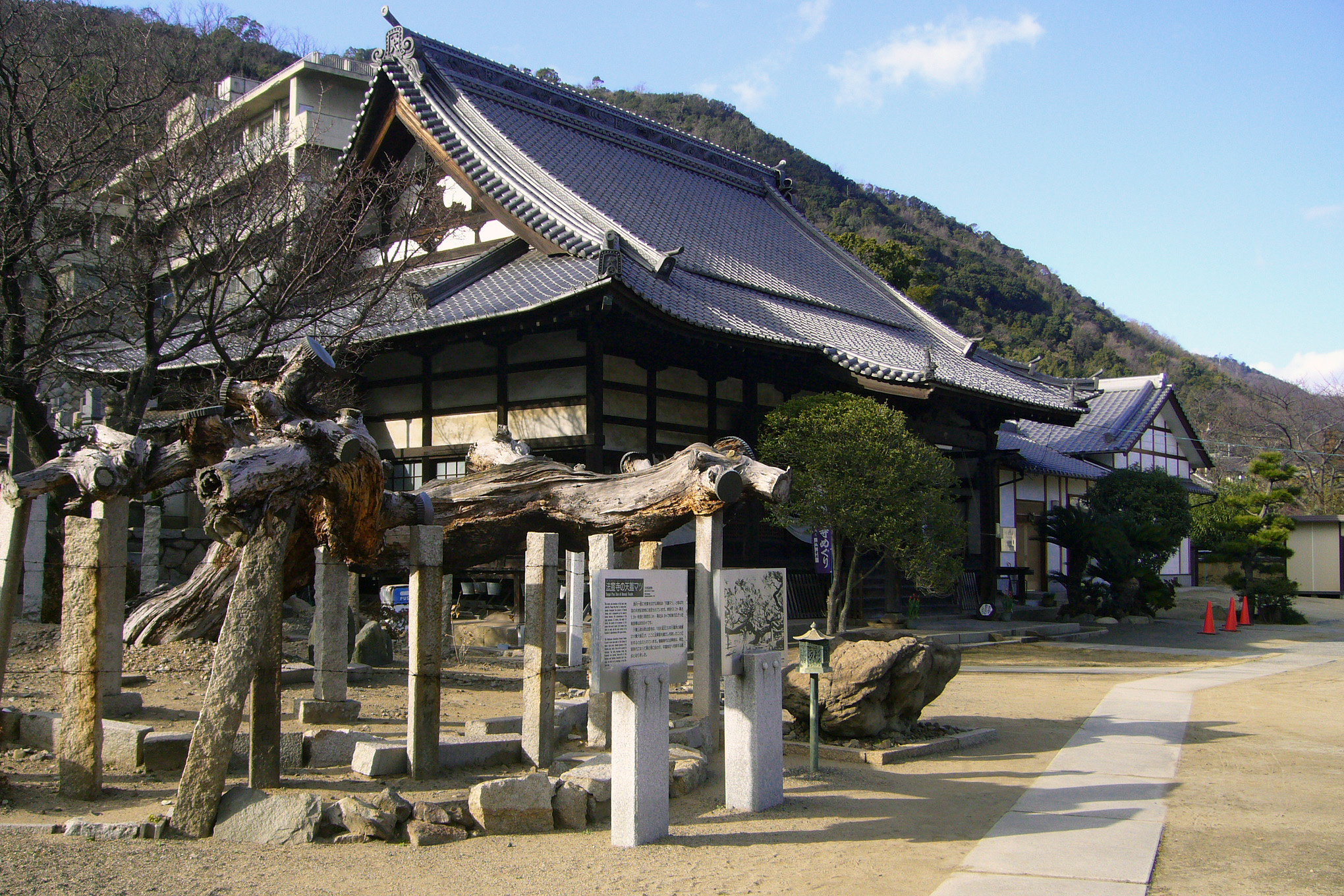 Hosenji in Fukuyama, Hiroshima, Japan